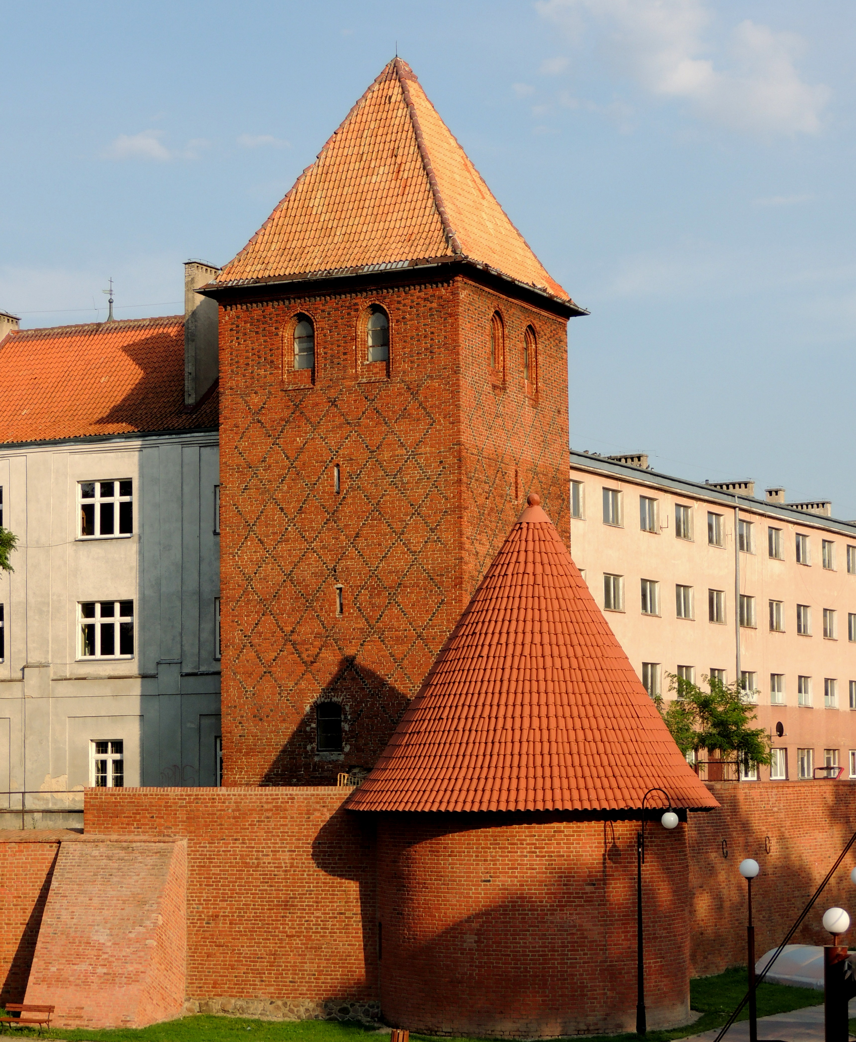 Braniewo, wieża, XIV